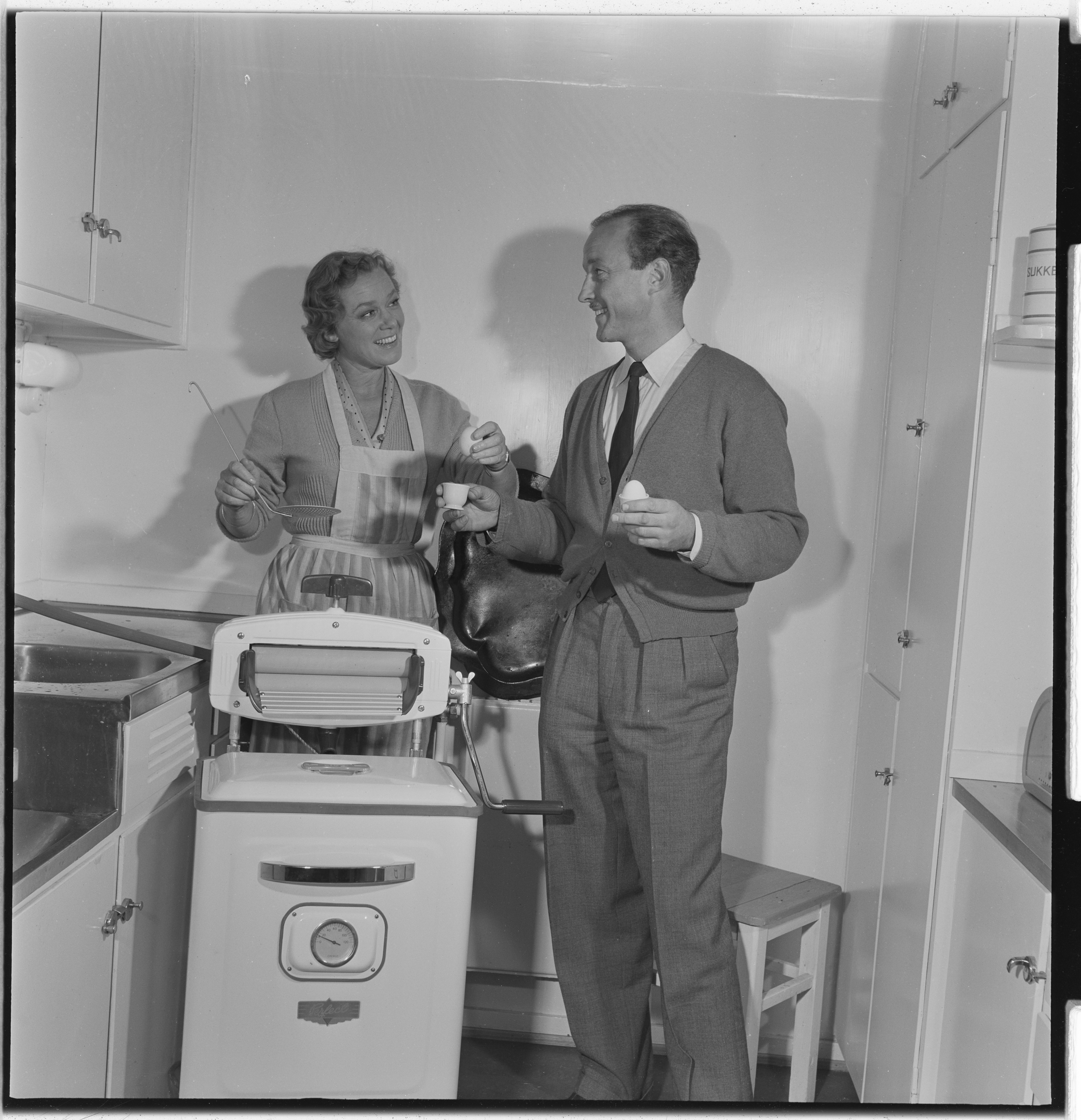 Bildet er hentet fra Arkivverket. Perfect vaskemaskin. Frank Robert og Randi Brenne. Annonse. Arkivinstitusjon : Riksarkivet Arkivnavn : Billedbladet NÅ Sted : Norge, Ukjent, Ukjent, Ukjent Emneord: reklame, vaskemaskin, skuespillere, menn, kvinner, husarbeid Avbildet: Robert, Frank;Brænne, Randi